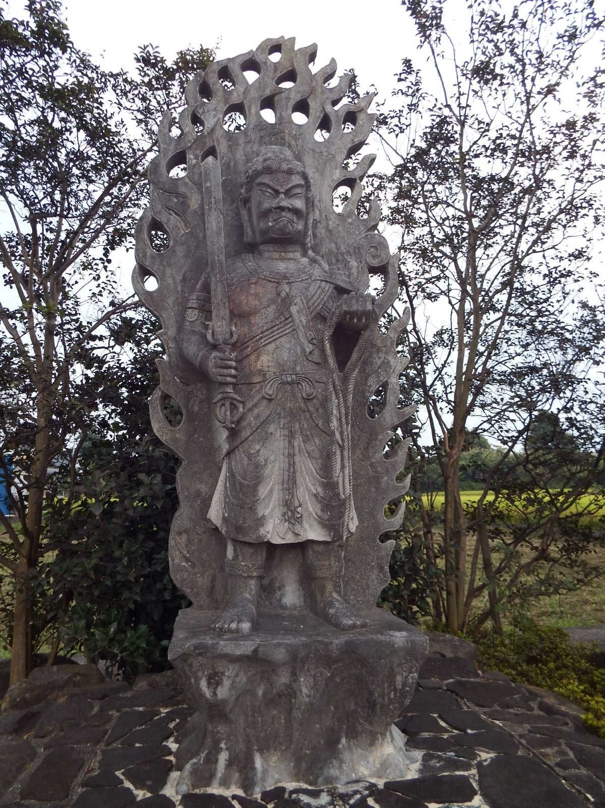 妙音寺の不動明王